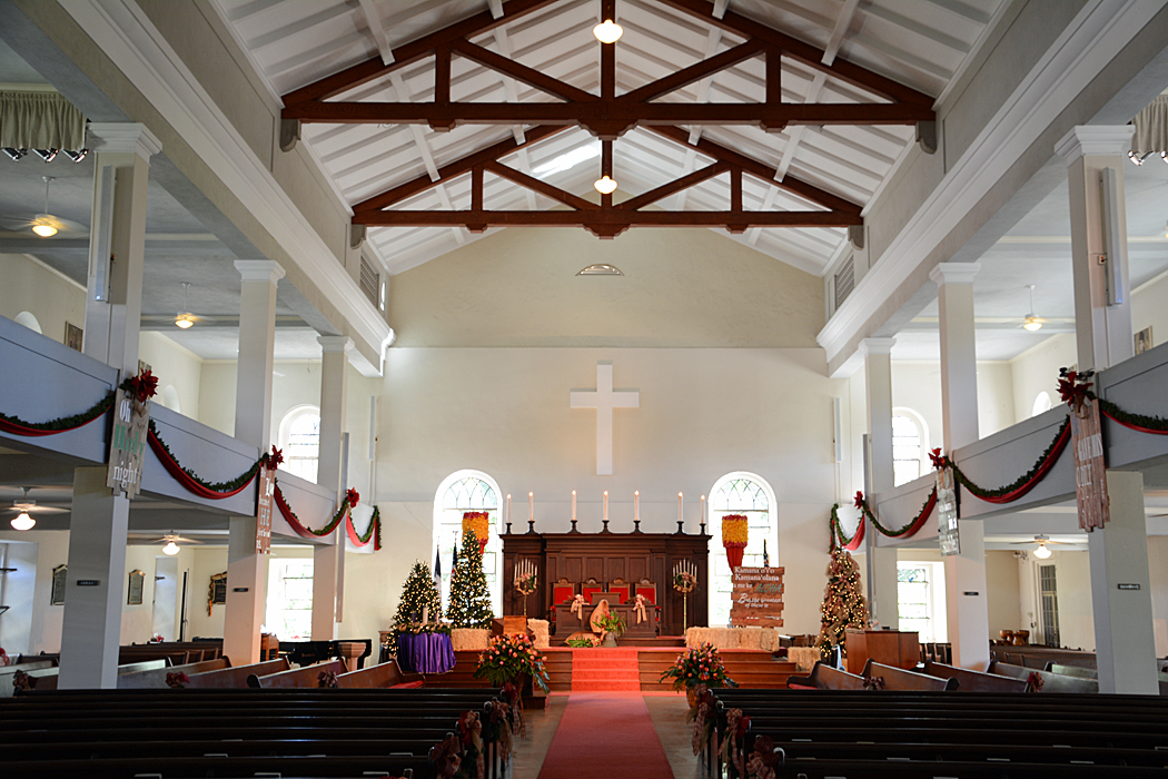 Kawaiaha'o Church, Honolulu